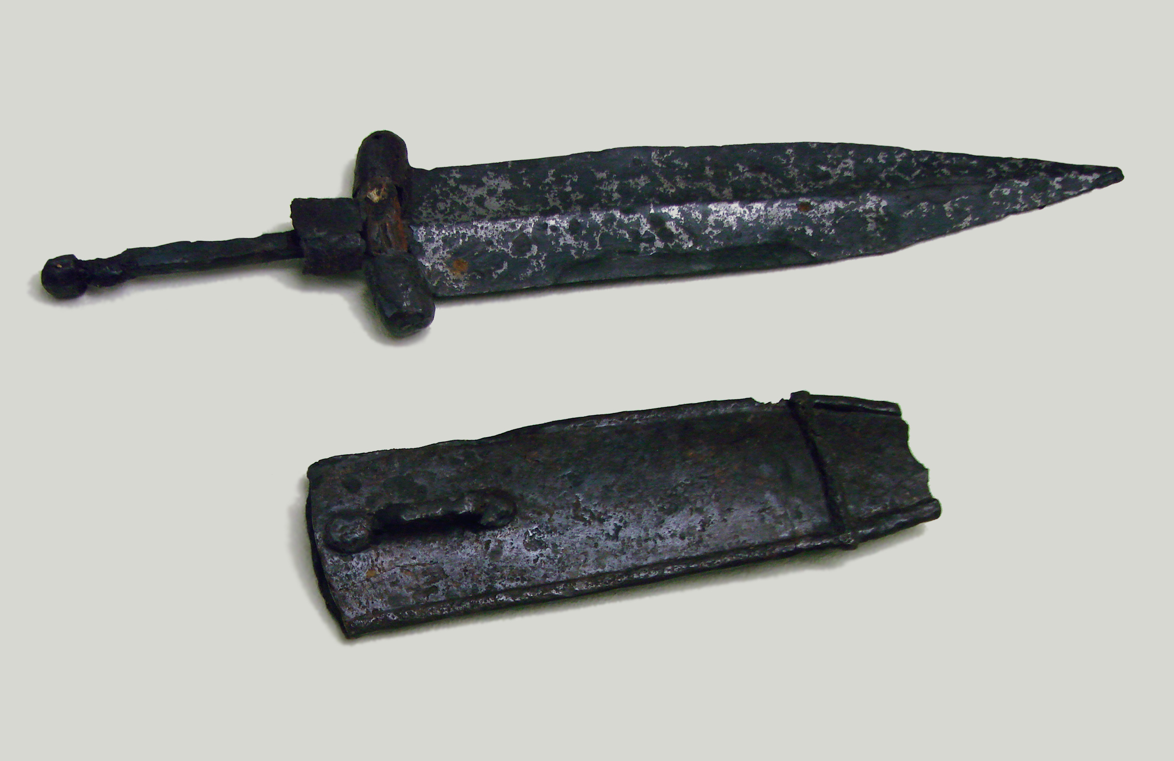 Dague et son fourreau, nécropole de Prosnes (Marne), période de la Tène ancienne, vers 475-450 - JC. Musée Saint-Remi à Reims.